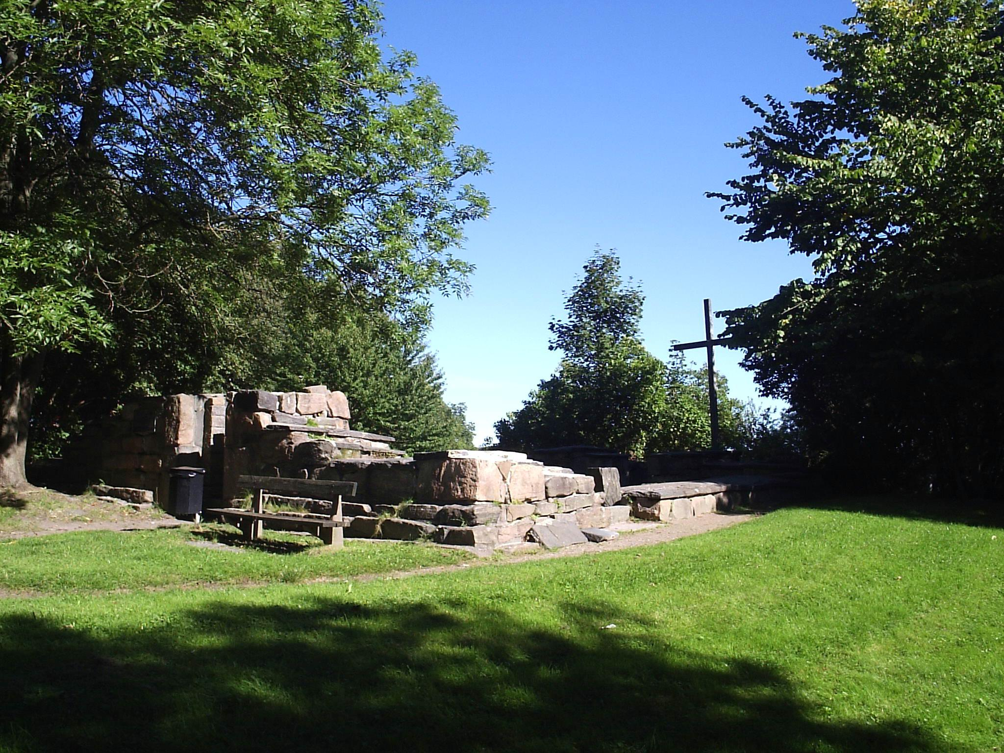 Härlanda kyrkoruin, den 11 september 2005. Fotograferad av Harri Blomberg.